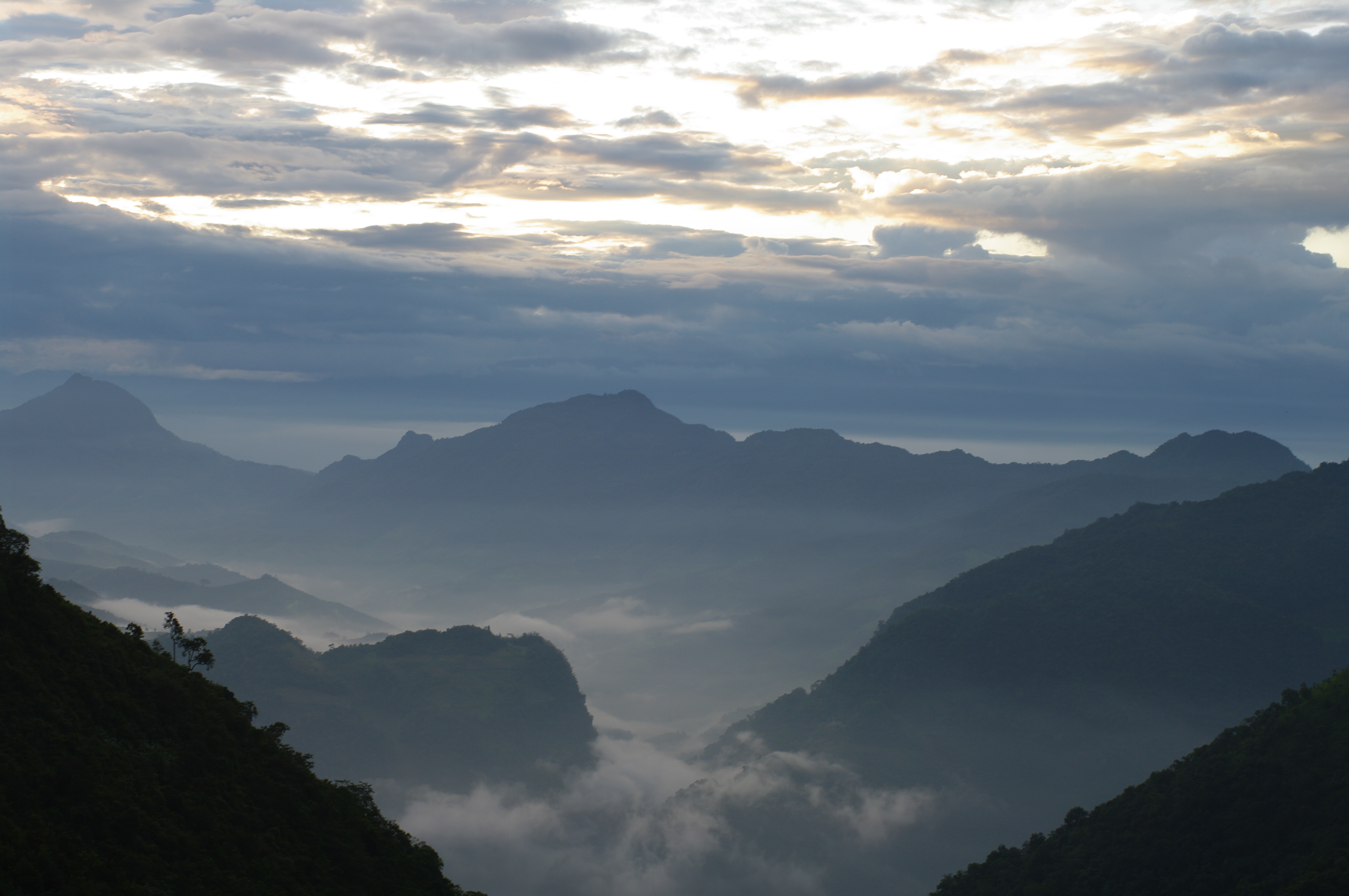 Frontière Yunnan-Mianmar, région Wa